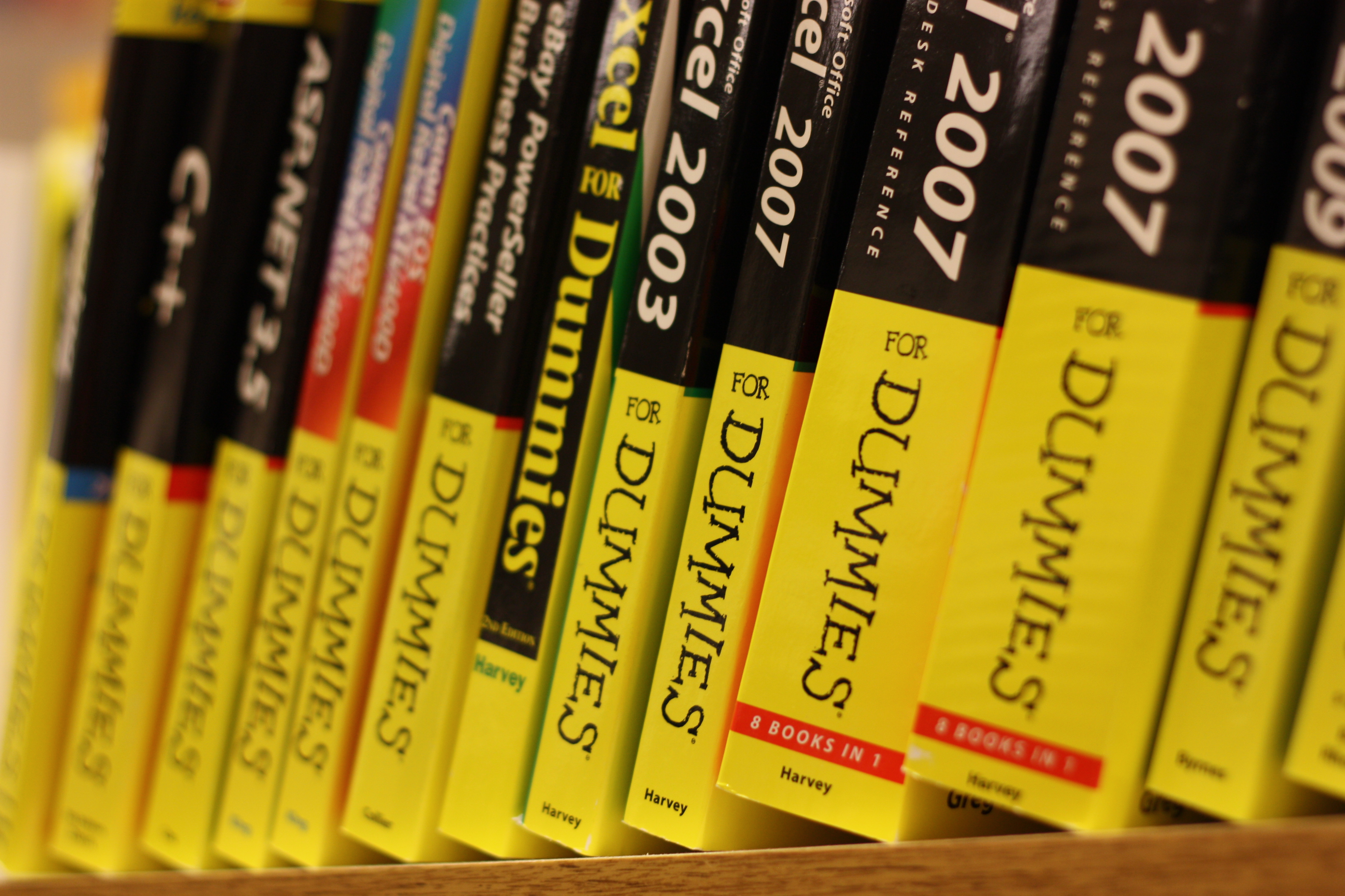 Dummies